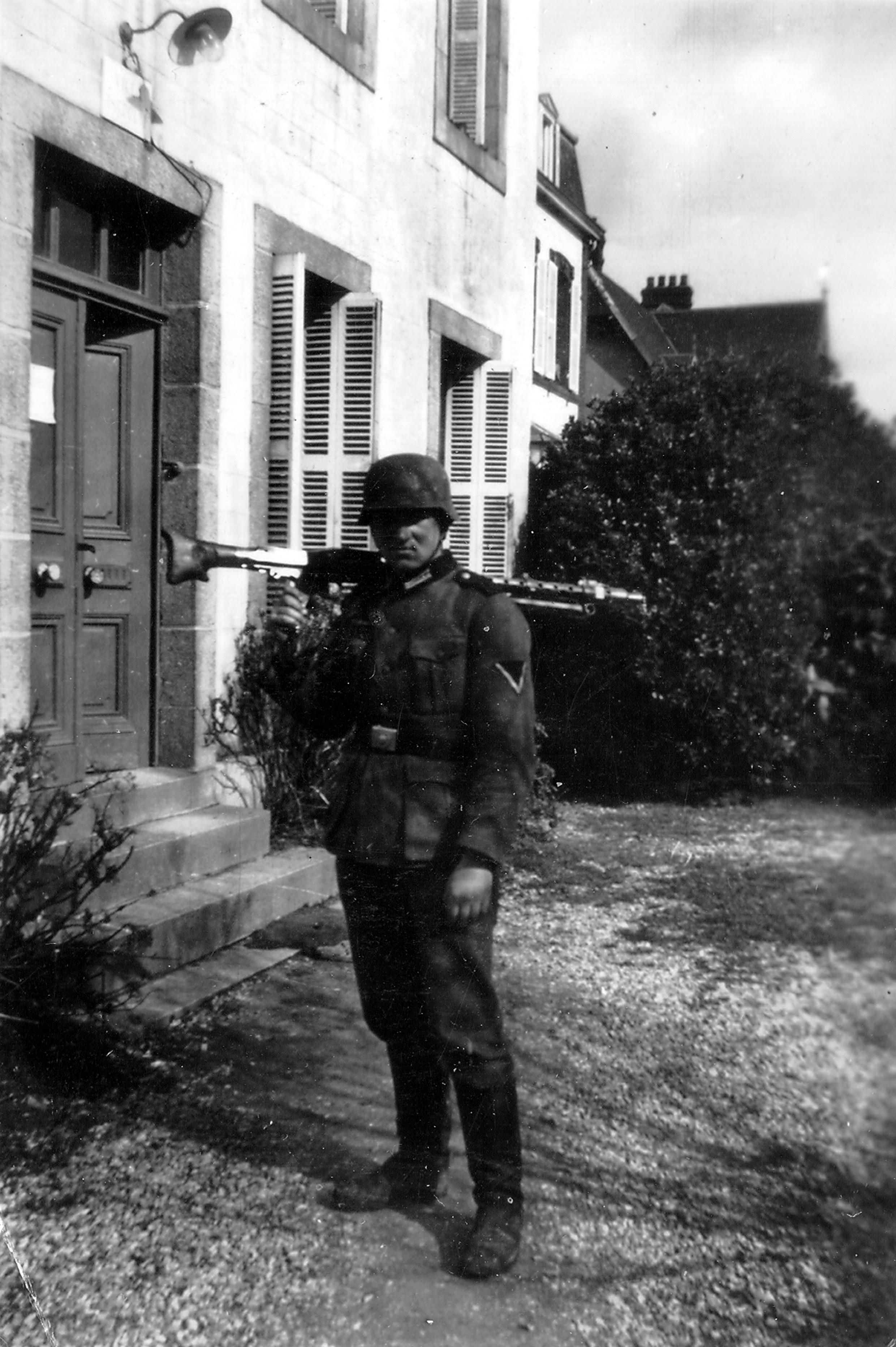 Photographie allemande - Occupation de la Normandie : Sentinelles diverses (col. Normandie Mémoire)